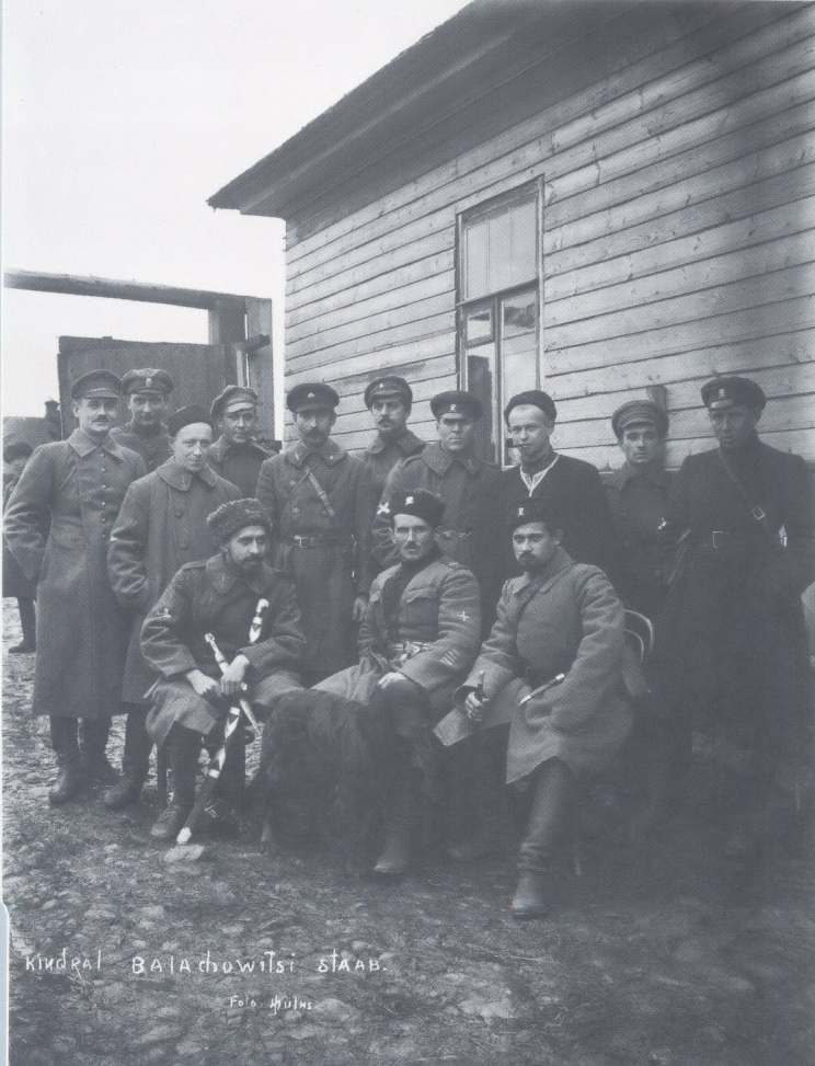 Беларуская (тарашкевіца): Станіслаў Булак-Балаховіч са сваім штабам, кастрычнік-лістапад 1919.